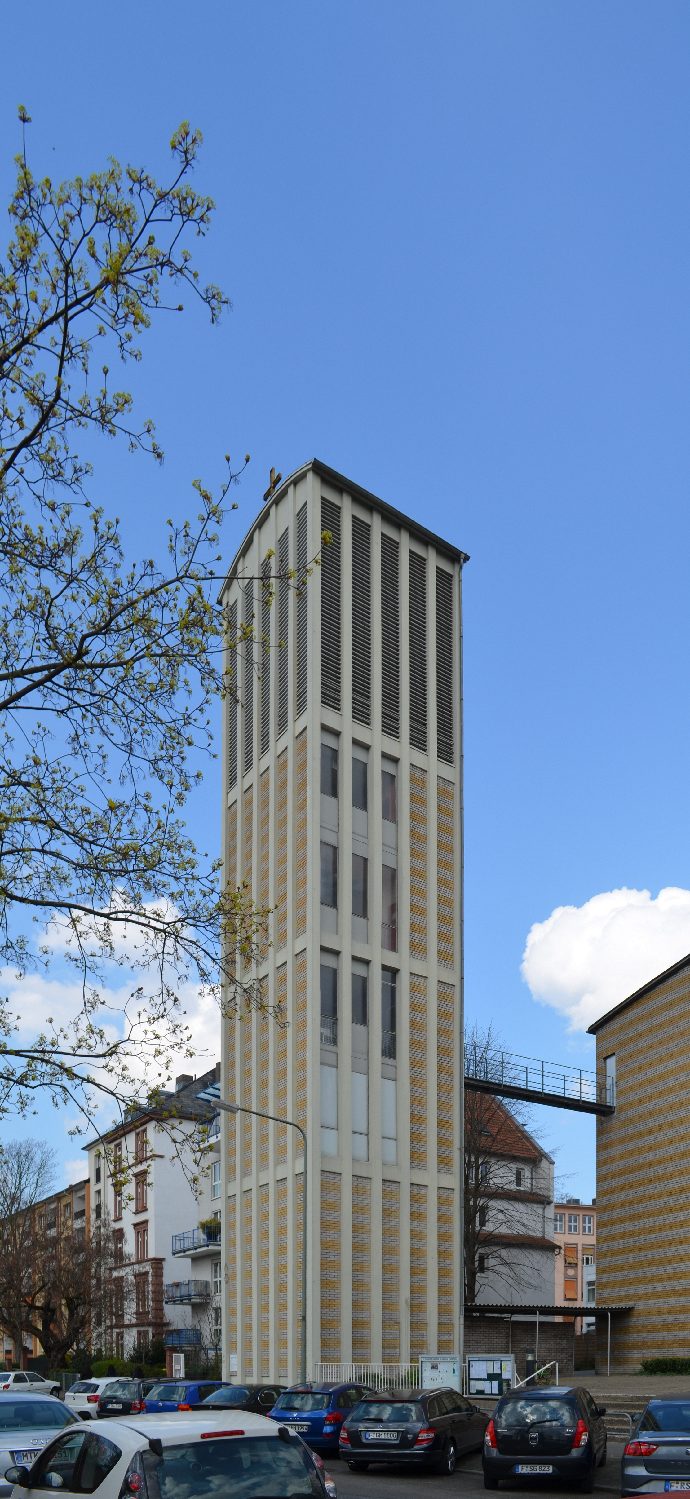 Frankfurt, Allerheiligenkirche, Turm